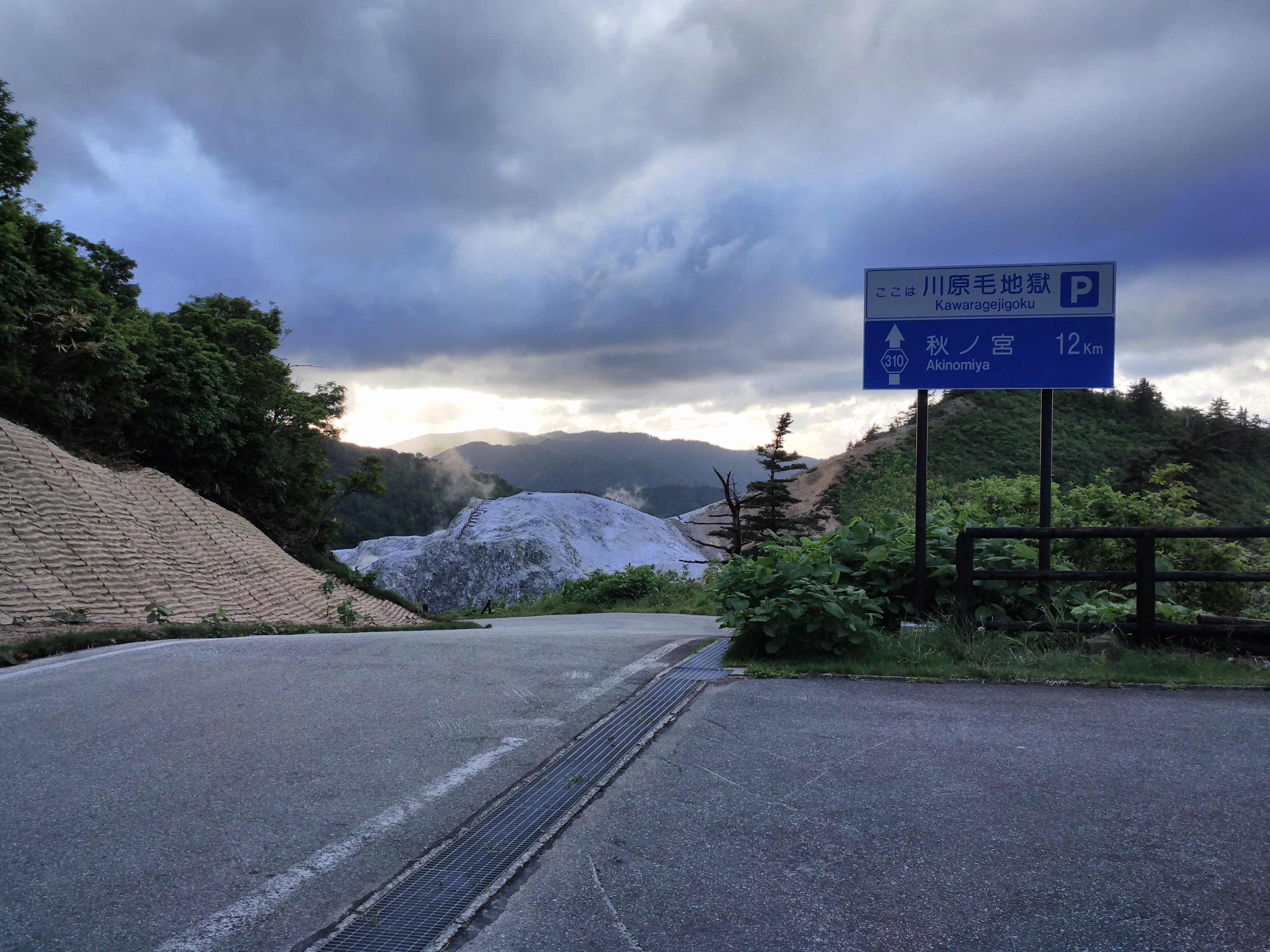 川原毛地獄駐車場で撮影